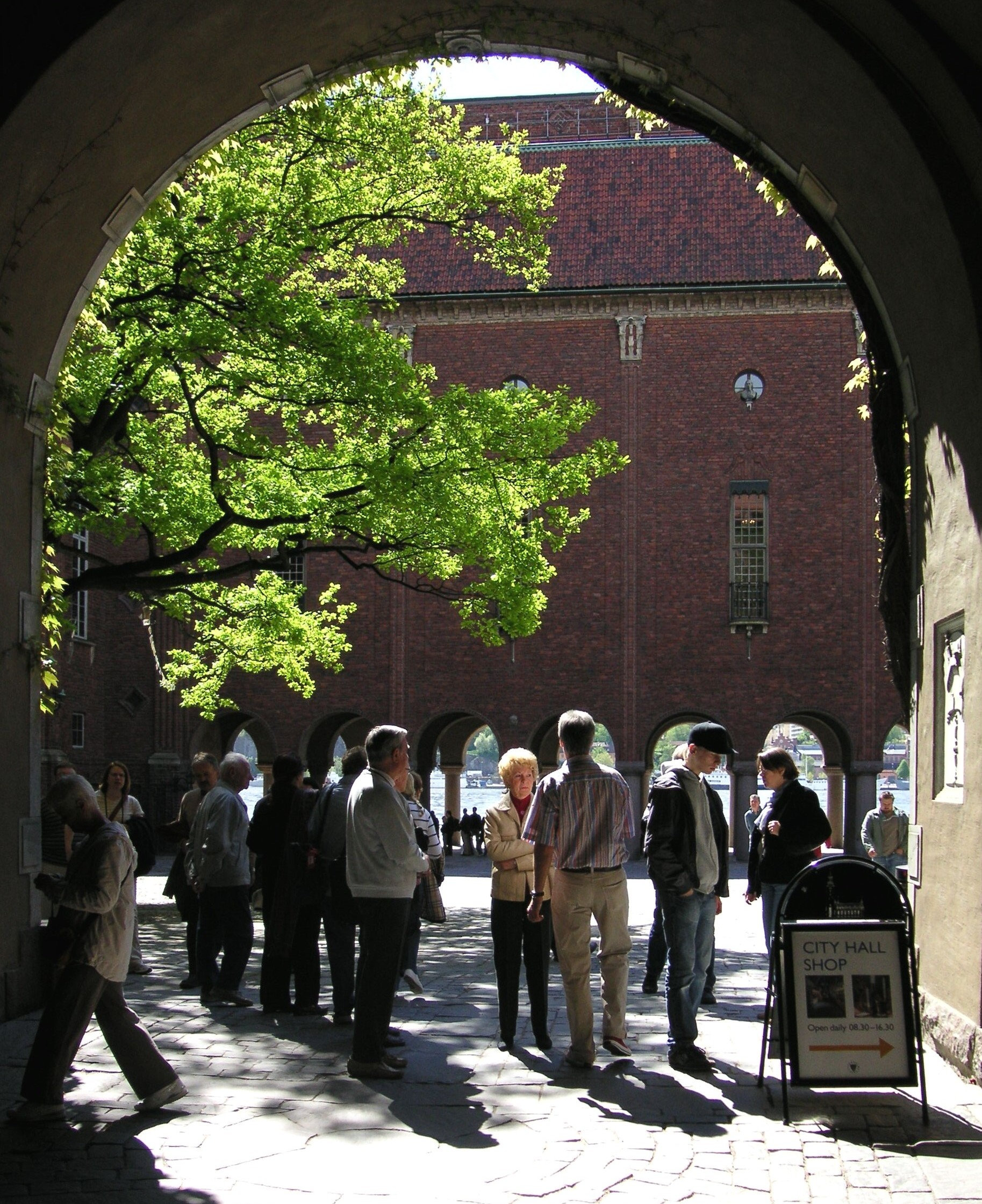 Stockholms stadshus, portal mot Hantverkargatan